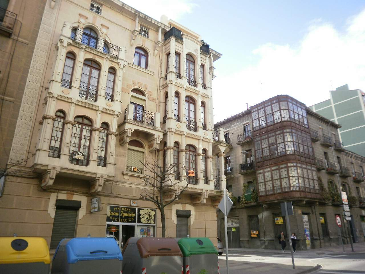 Miranda de Ebro (Burgos)